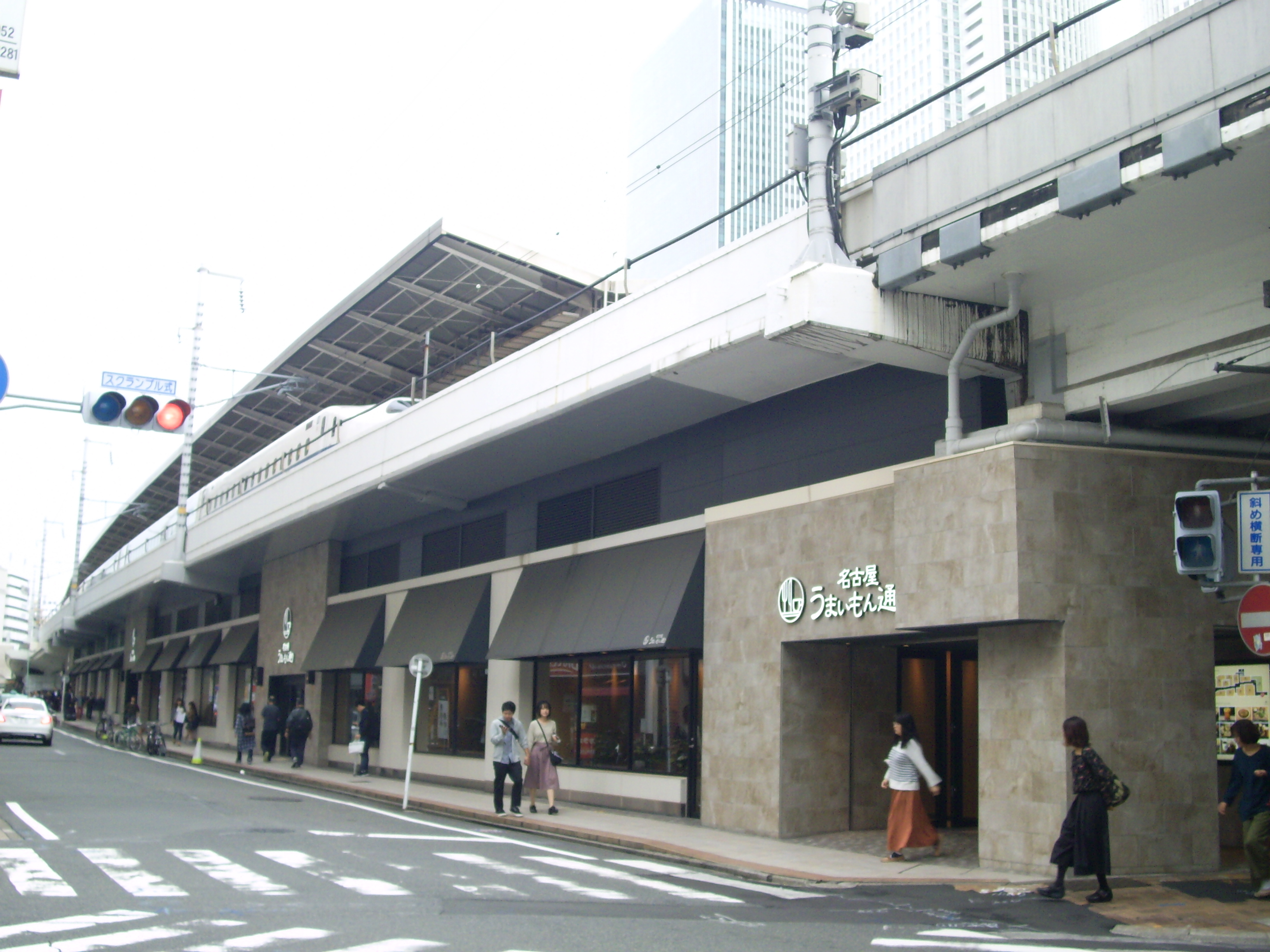 名古屋駅東海道新幹線ホーム階下に立地する名古屋うまいもん通り㊟カメラを起動すると日付機能が出荷時のものに初期化されるため、ファイル履歴の撮影・投稿日時とメタデータの原画像データの生成日時が異なります